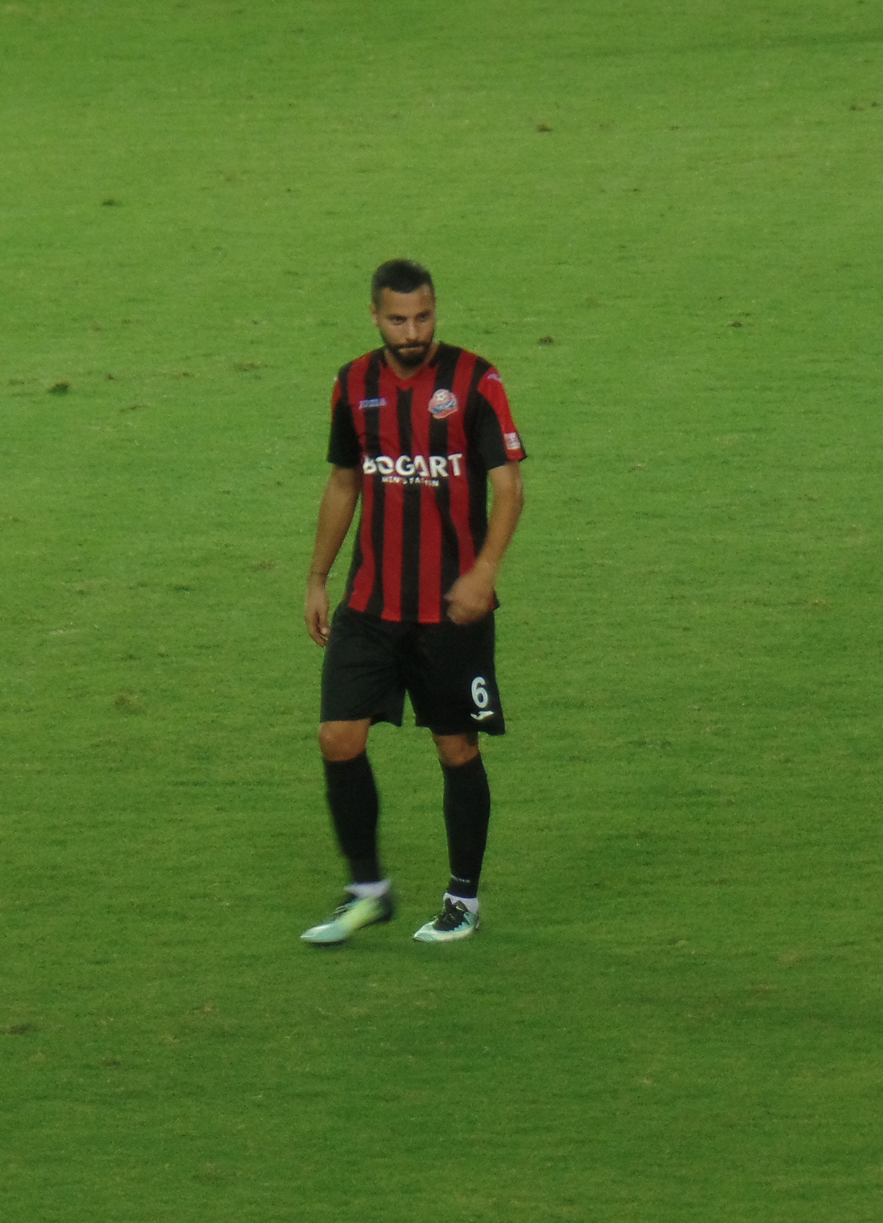 גל אראל במדי הפועל חיפה